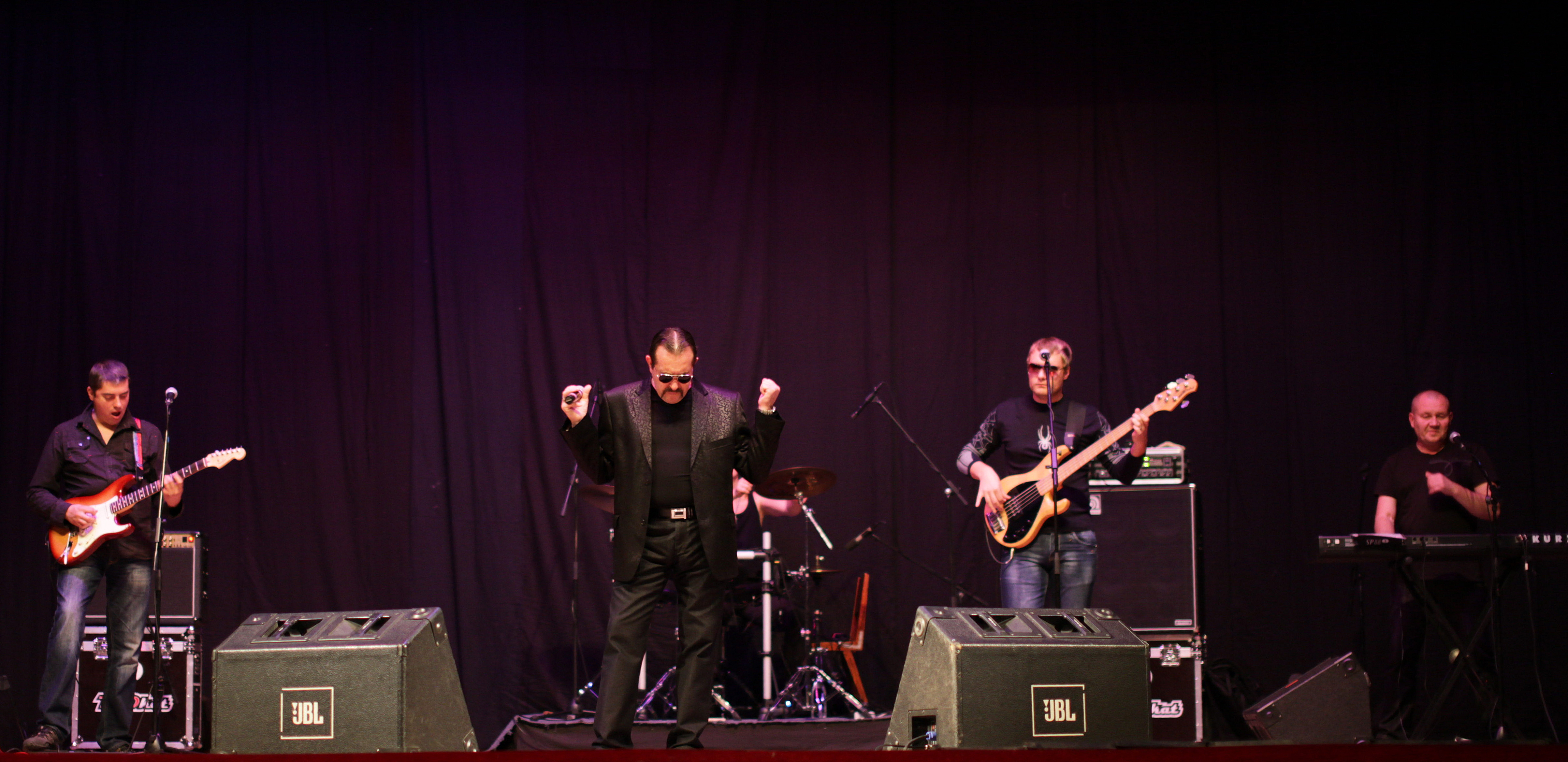 «Группа Бутырка». Концерт в Доме Корабела города Северодвинска.